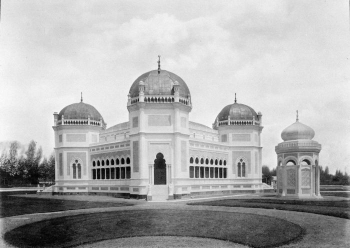 Foto. Het exterieur van de grote moskee in Medan.